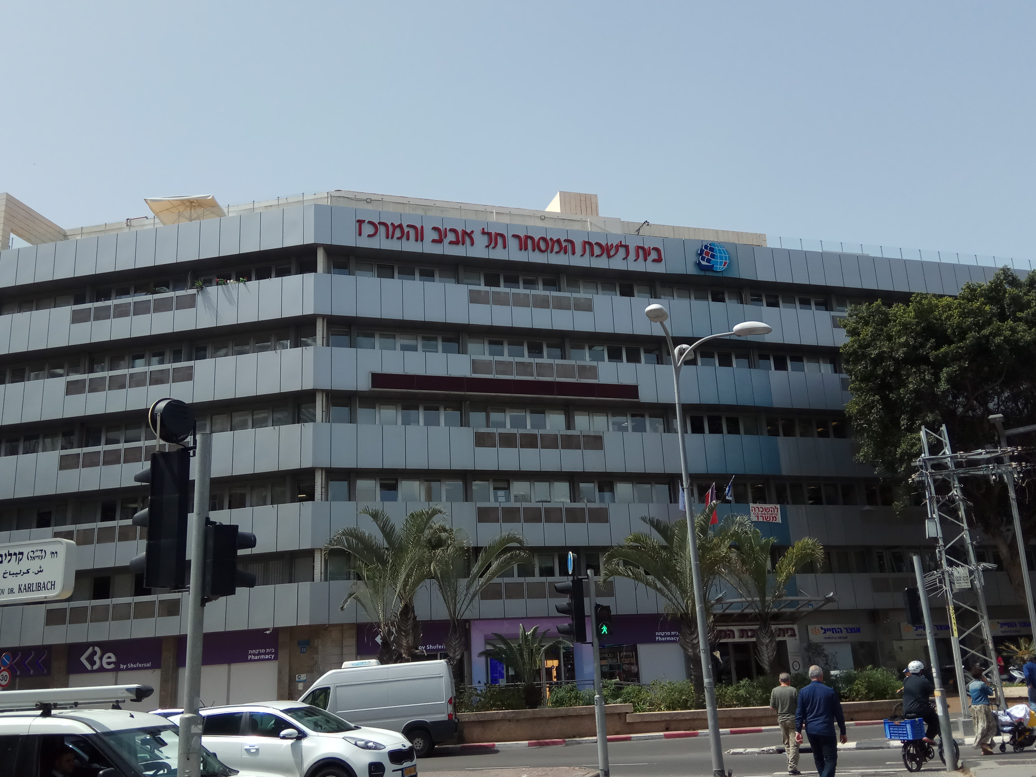 בית איגוד לשכות המסחר ברחוב החשמונאים בתל אביב